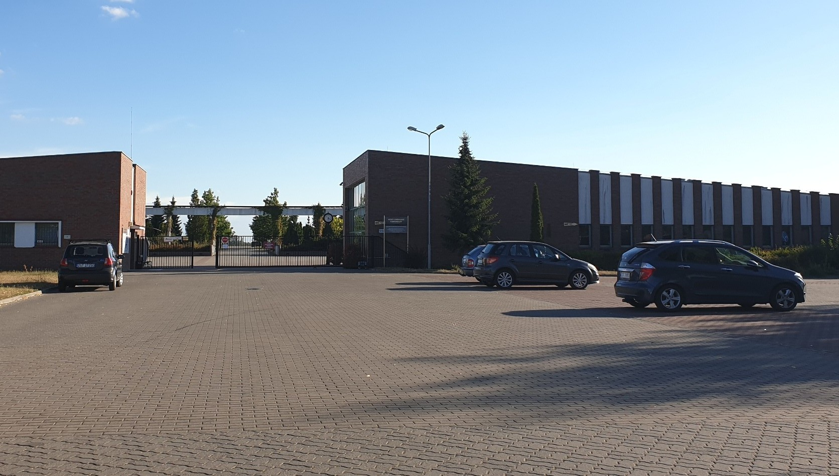 Stargard. Nowy Cmentarz Komunalny